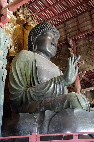 De Vairocana Daibutsu in de Daibutsuden van de Tōdaiji.